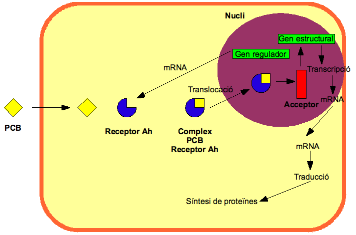 Mecanisme d'acció proposat pels PCB segons Safe S 1984